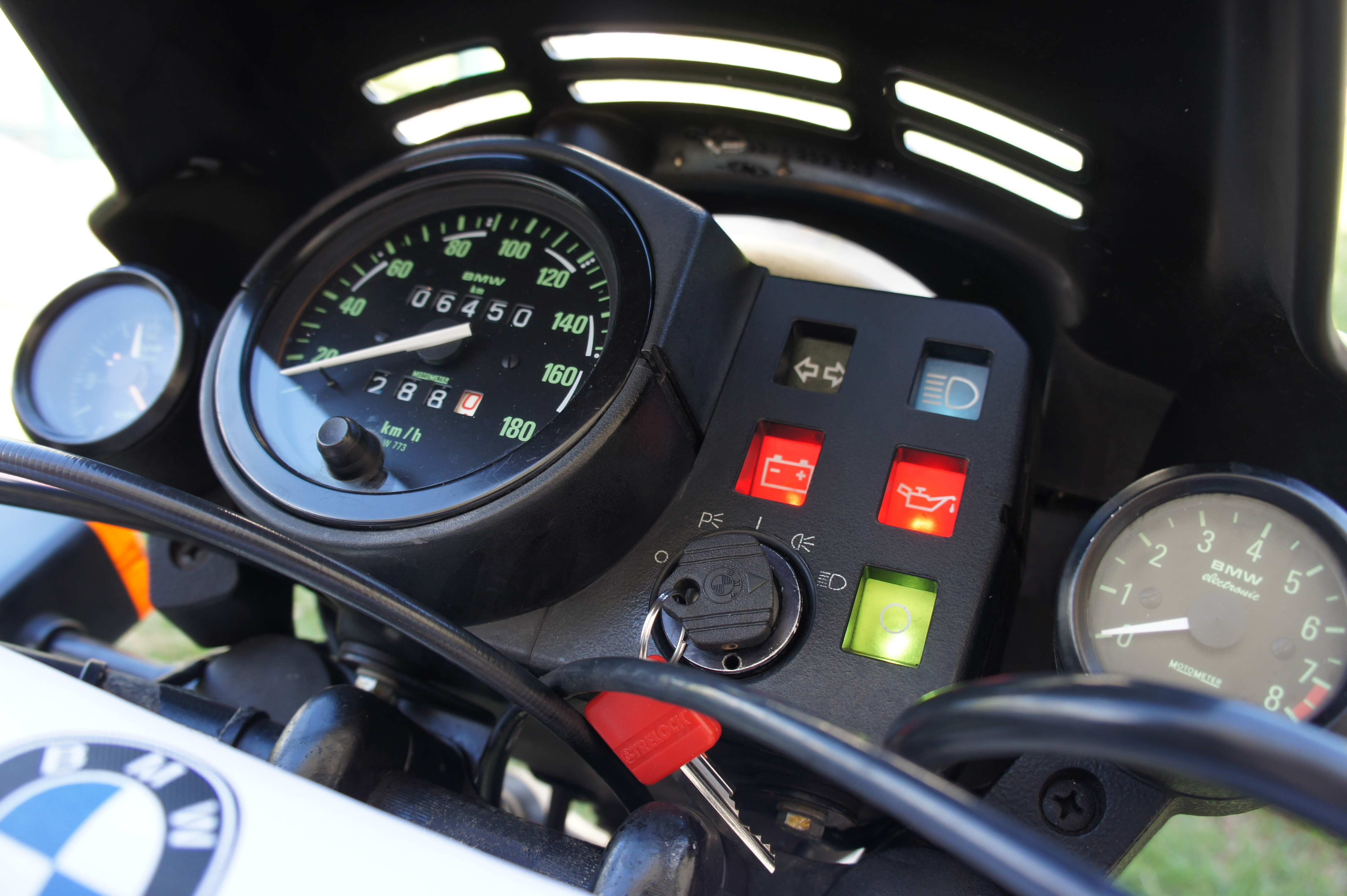 Compteur d'une BMW R80G/S de 1981 avec option compte tour et horloge. Saute vent posterieur à 1981.